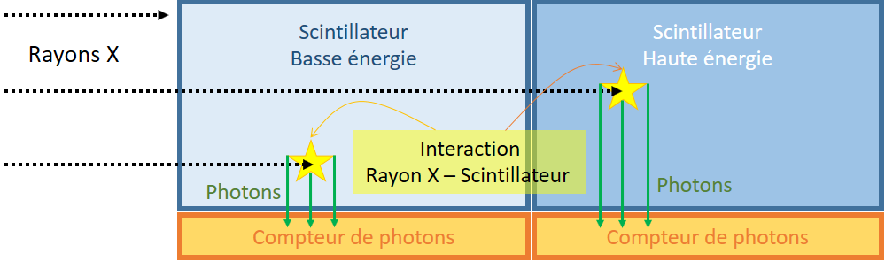 synoptique d'un détecteur sandwich